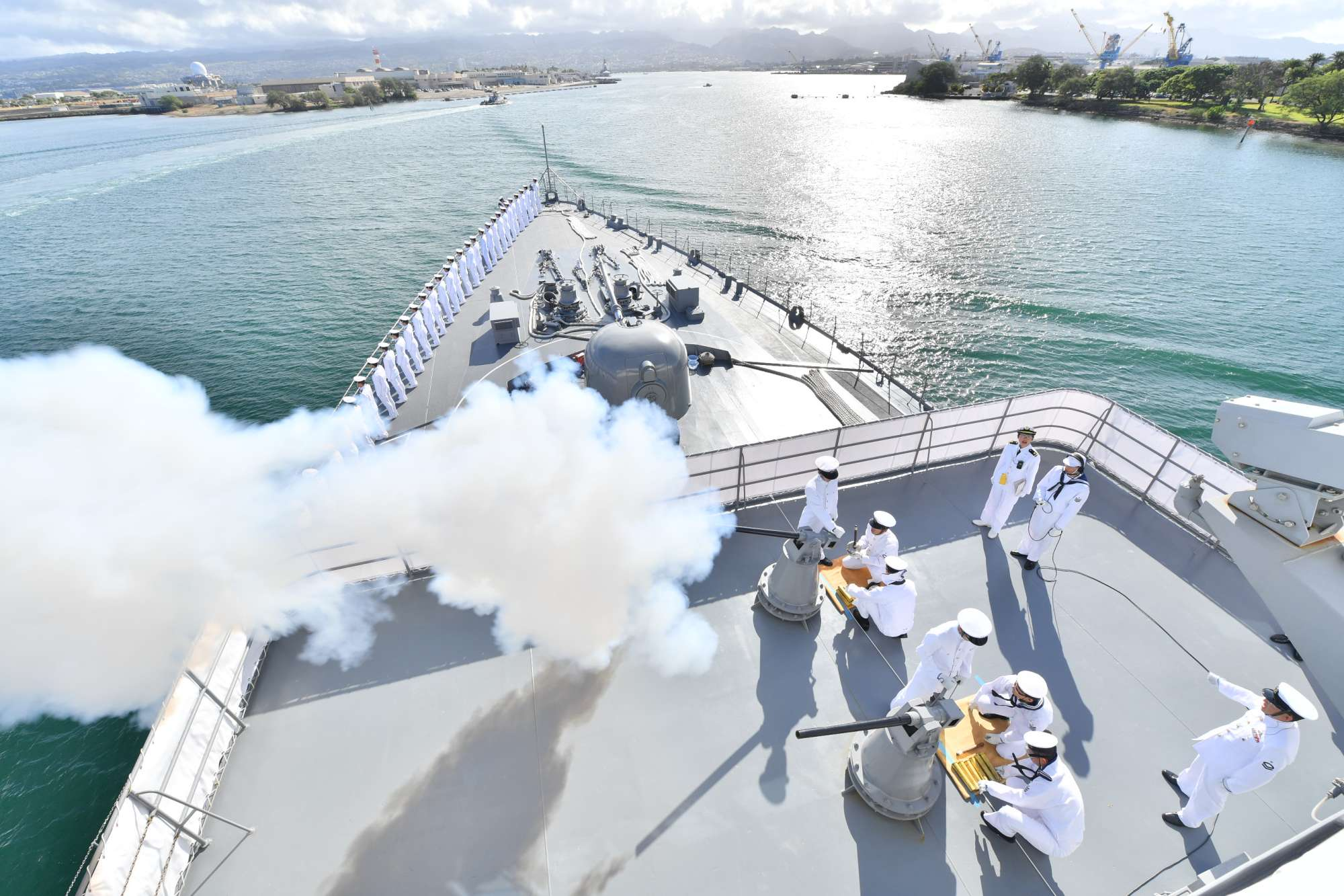 JMSDF Training Squadron TV-3508"Kashima" Gun Salutes